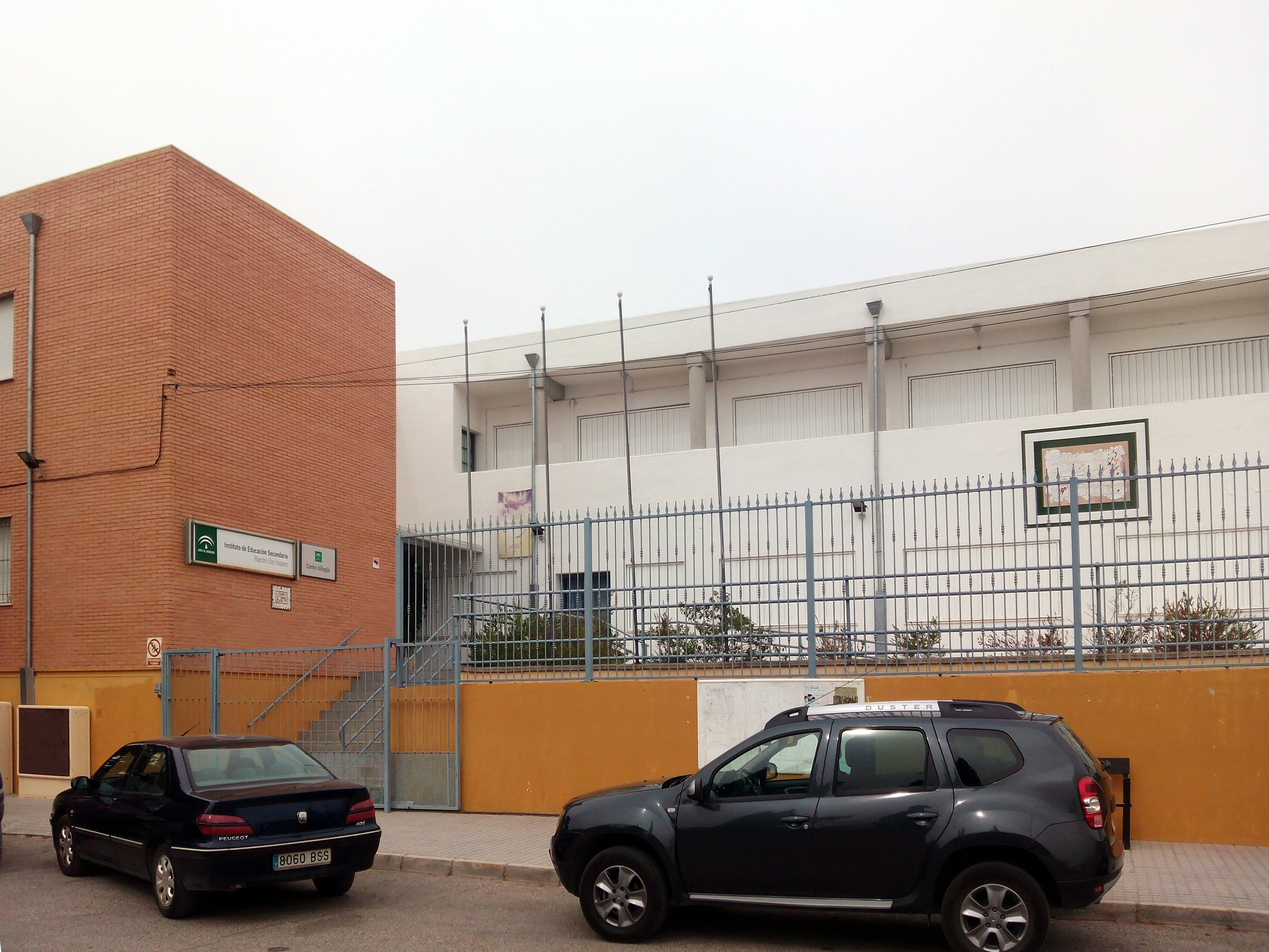 Instituto de Educación Secundaria Obligatoria "Maestro Eloy Vaquero", Montalbán de Córdoba (España).